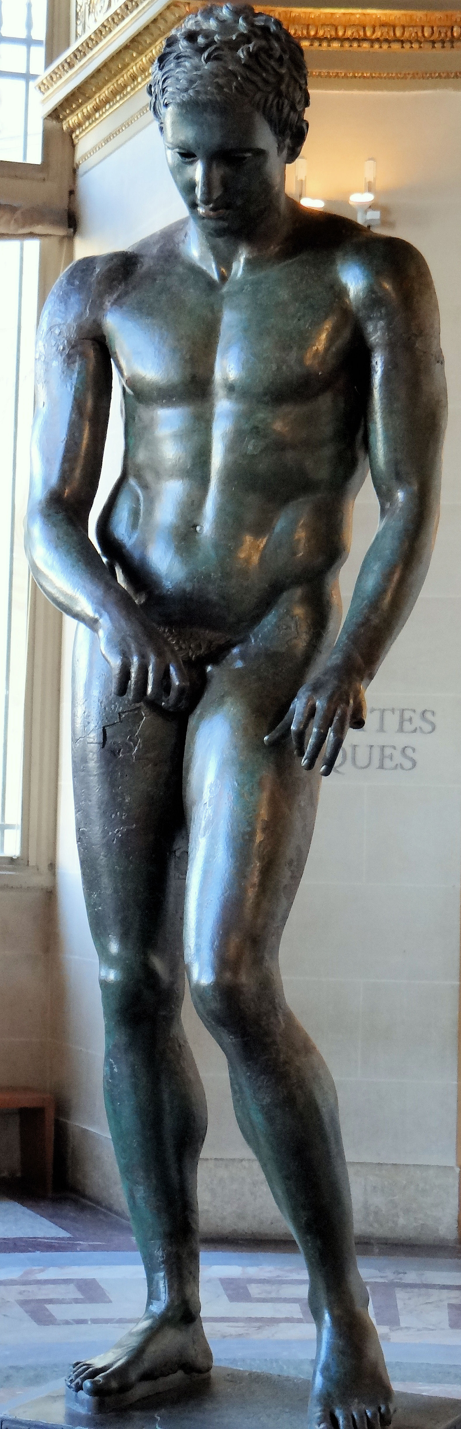 Apoxyomène de Croatie exposé au musée du Louvre